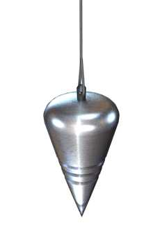 Senklot